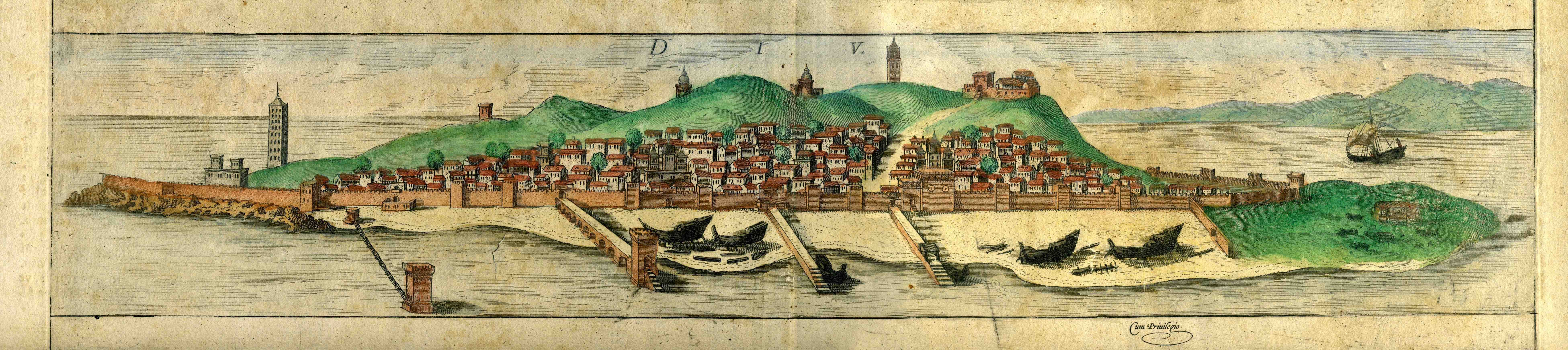 Ville de Diu de l'Atlas de Braun et Hogenberg